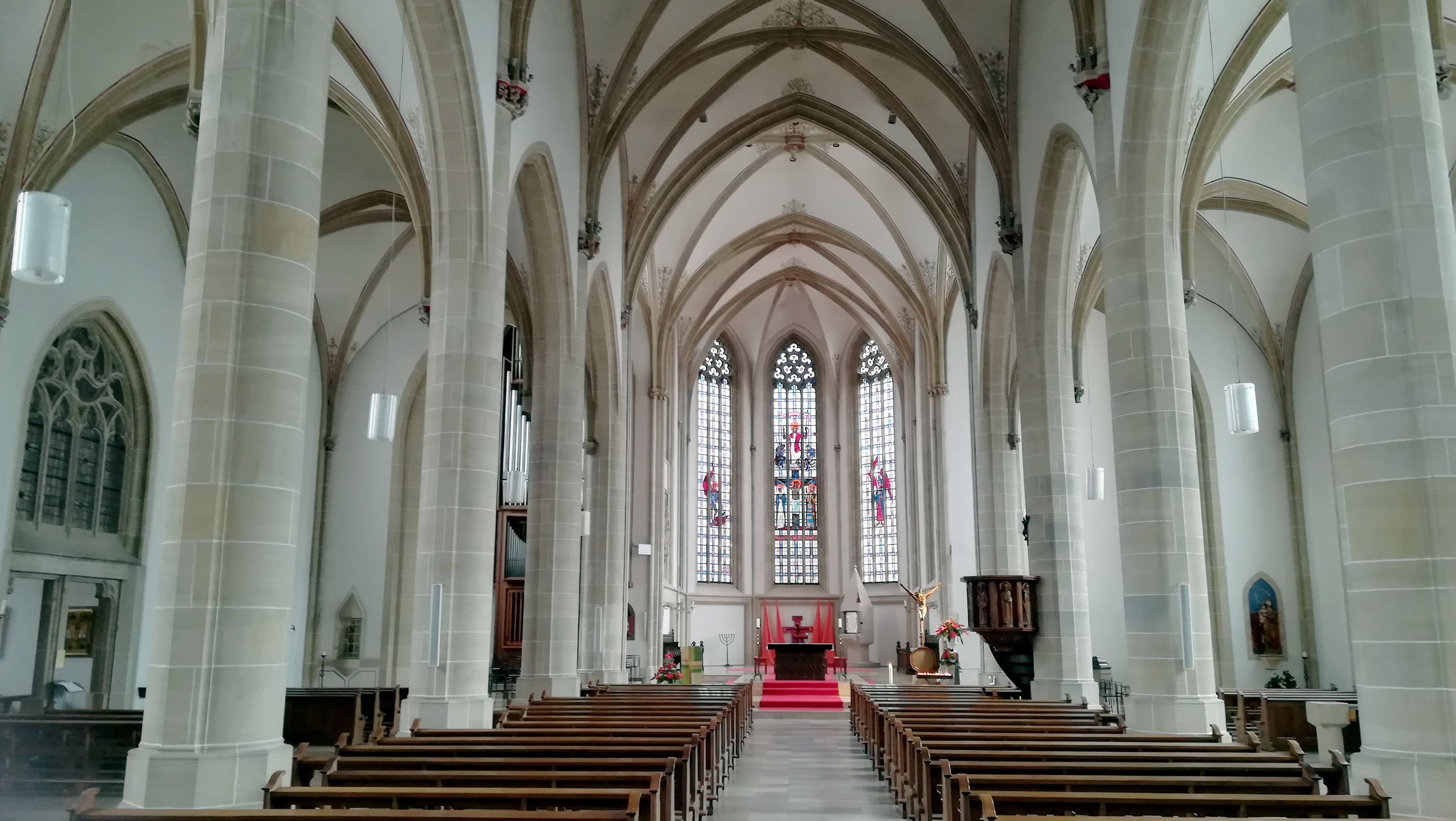 Die römisch-katholische Kirche St. Georg ist eine gotische Hallenkirche des 15. Jahrhunderts und die Hauptkirche der westfälischen Stadt Bocholt.